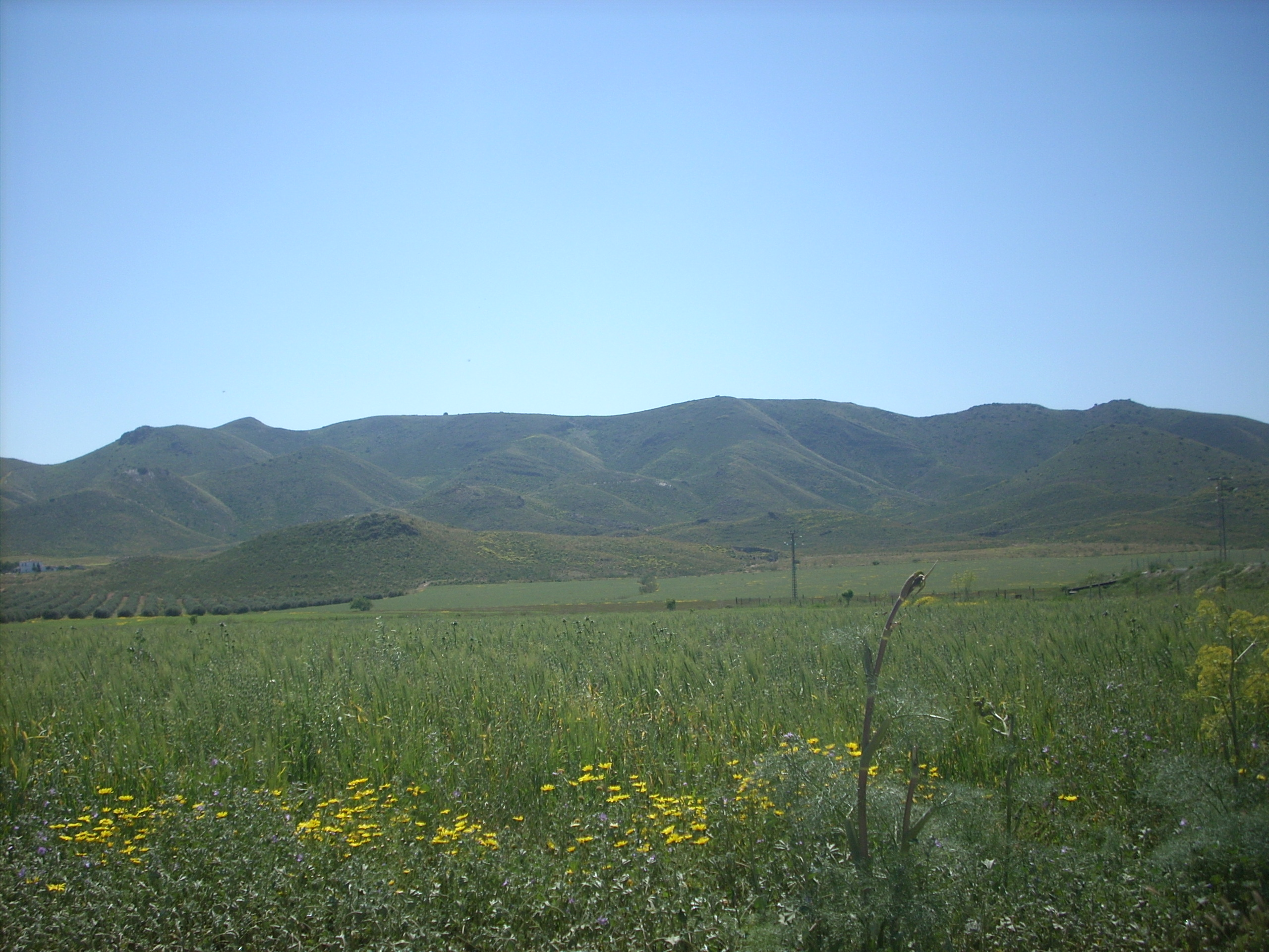 Vista de la Sierra de Enmedio desde la pedanía de Puerto Adentro